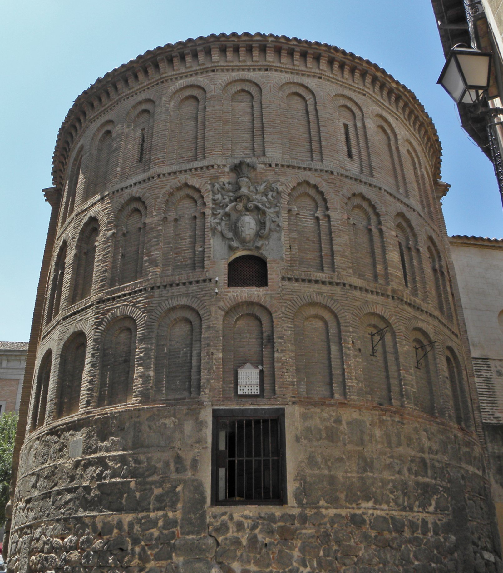 Iglesia mudéjar de San Vicente, erigida en honor a la Reconquista de la ciudad el 25 de mayo de 1085. De ella destaca su ábside que en Toledo es conocido como el Cubillo de San Vicente.